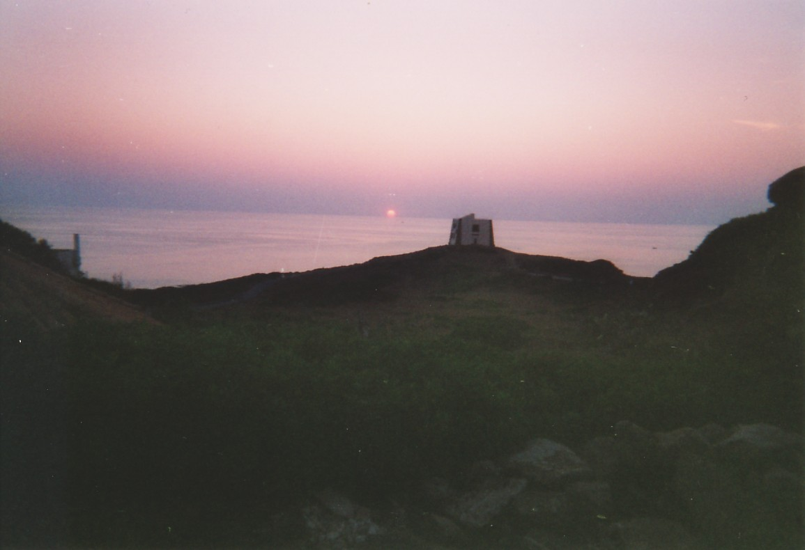 Ustica on sunset